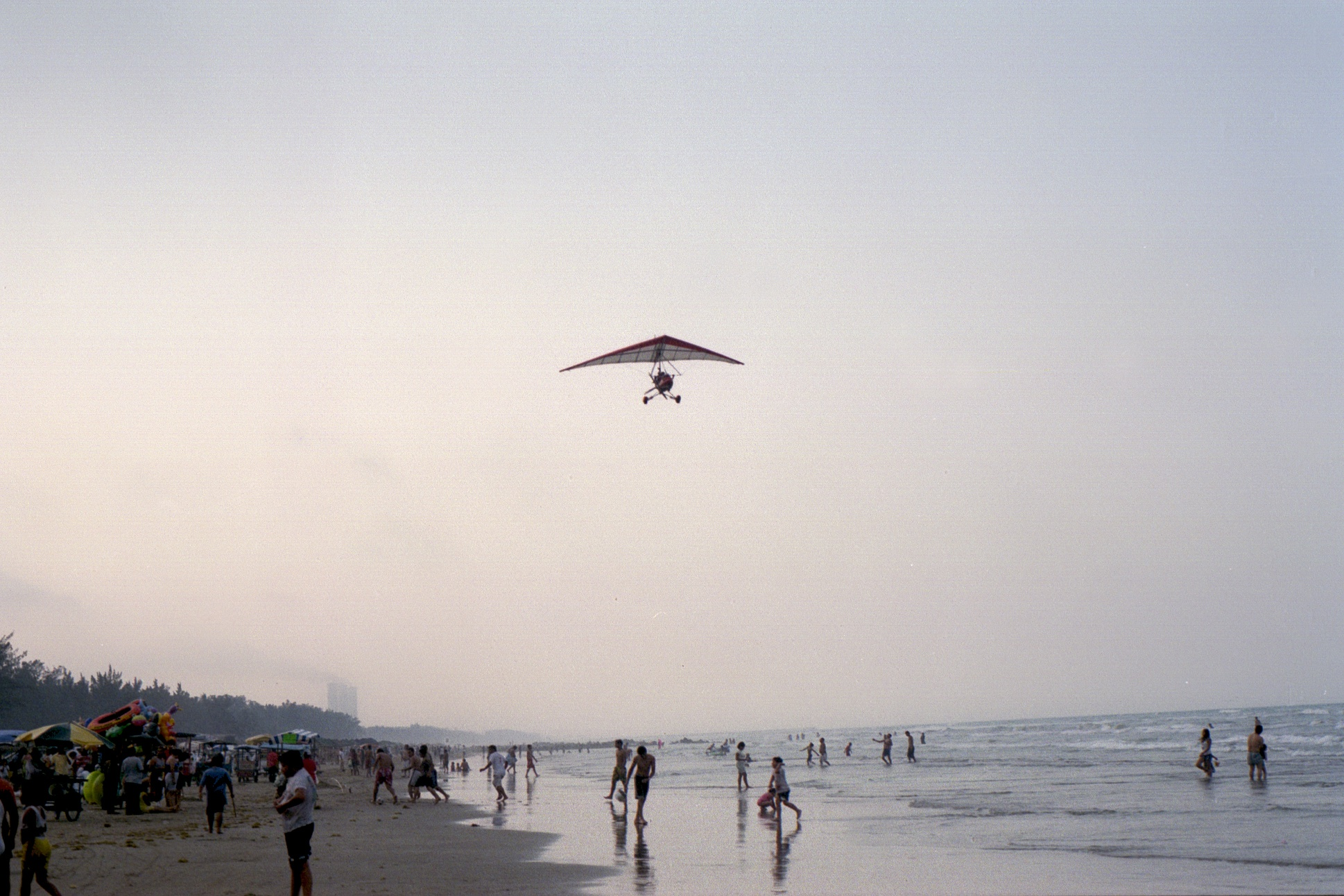 Panoramica de la Playa de Tuxpan.